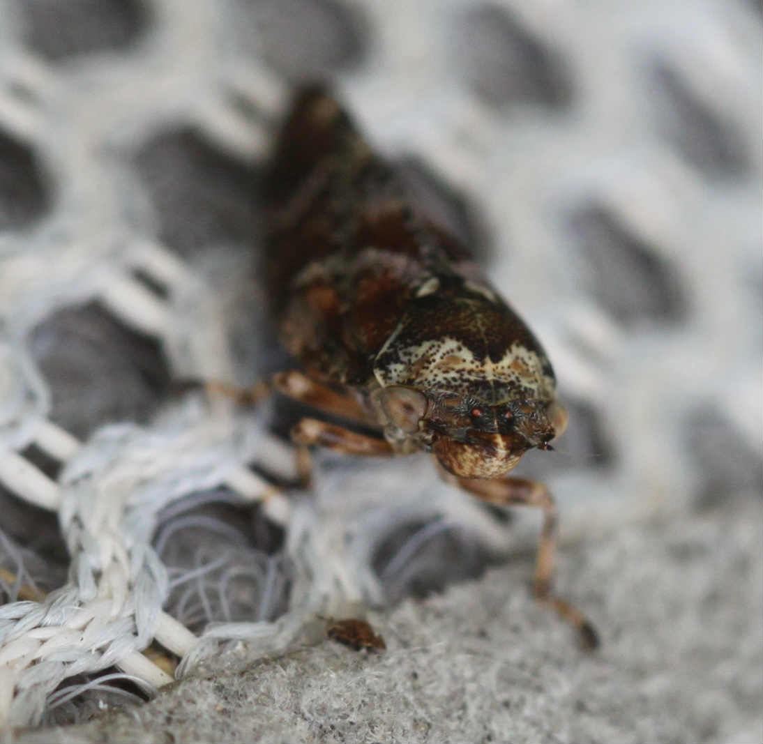 Kiefernschaumzikade (Aphrophora corticea) am 3.6.2017 in der Schwetzinger Hardt